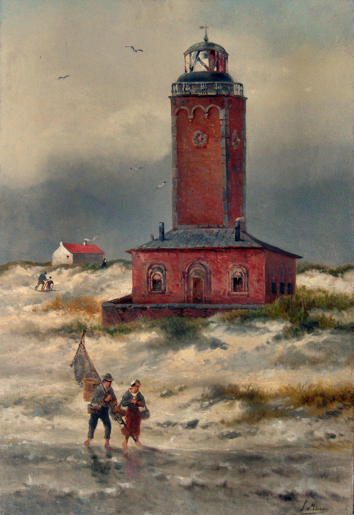 "Oude vuurtoren met garnaalvisser", schilderij van de vuurtoren van Knokke door François Musin (1820-1888): gemeentelijk patrimonium van Knokke-Heist, België